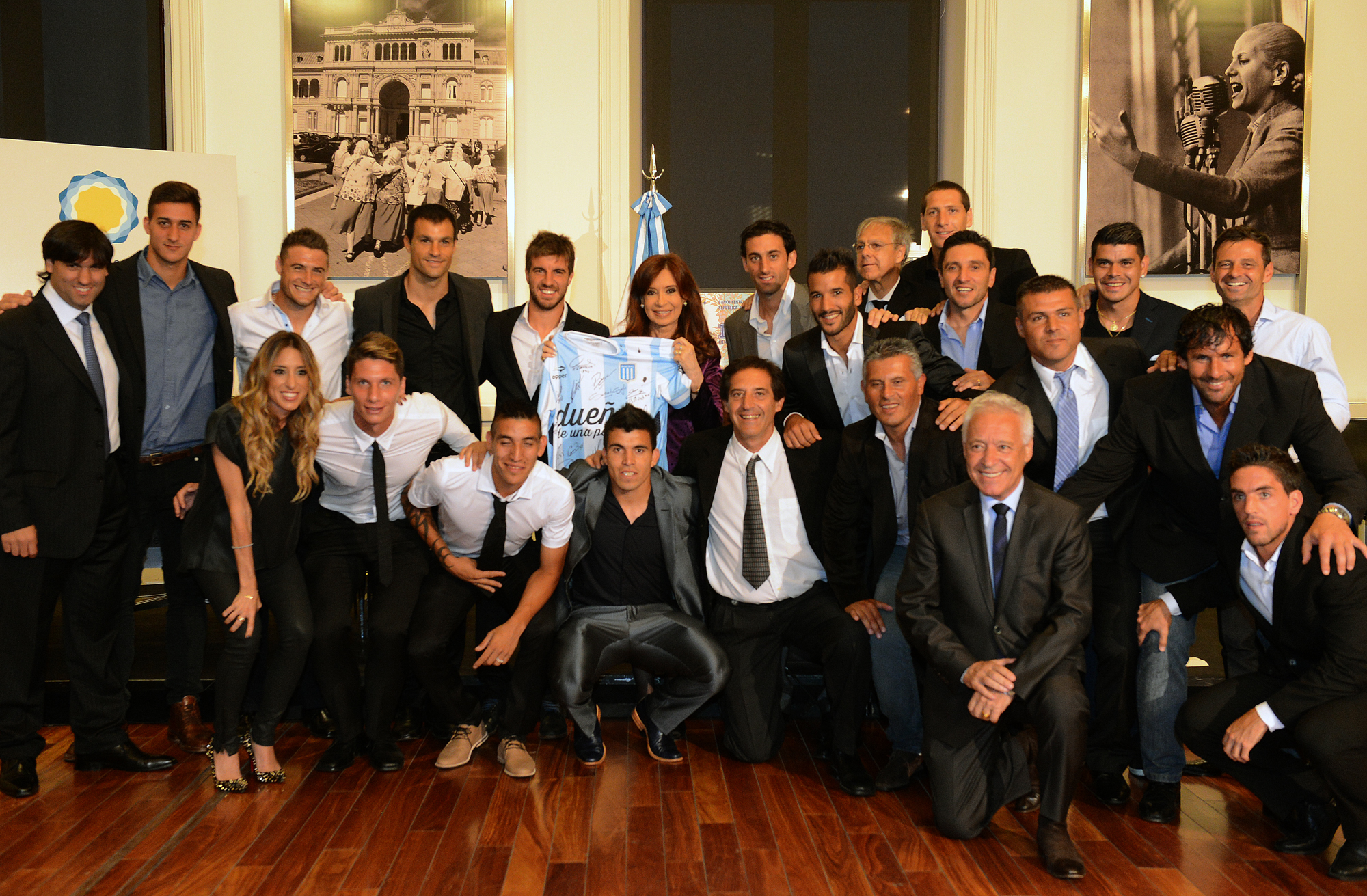 La presidenta Cristina Fernández recibe al plantel de Racing, ganador de la temporada.